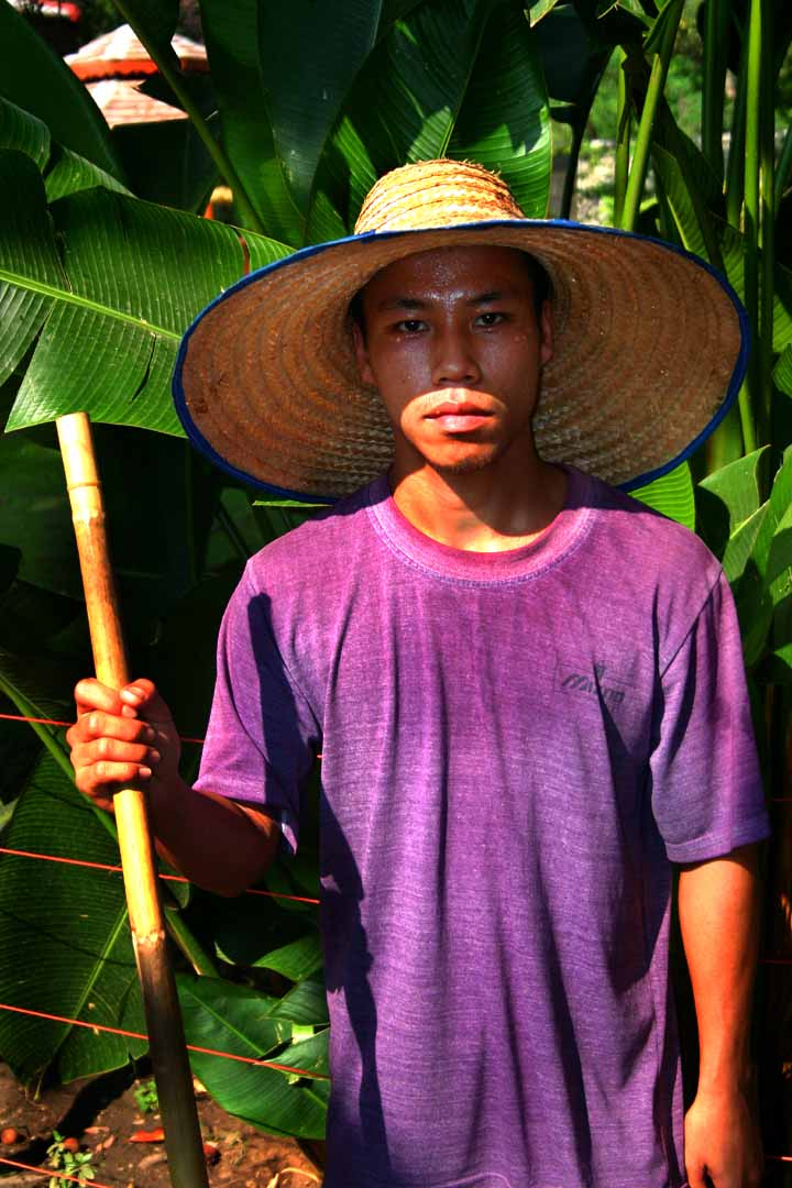 Chiangmai, Thailand